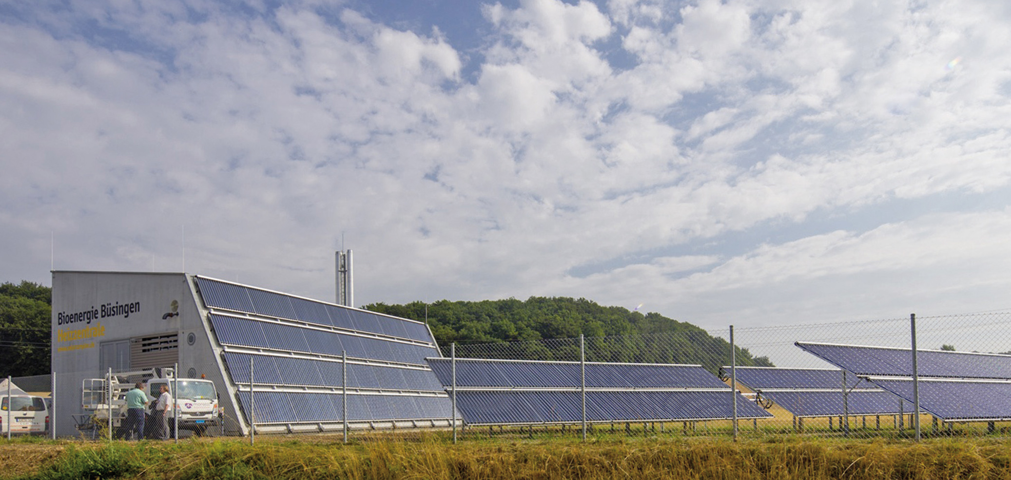 Heizzentrale (Hackschnitzel, 1,4 MW) und Solarthermie fürs Bioenergiedorf Büsingen